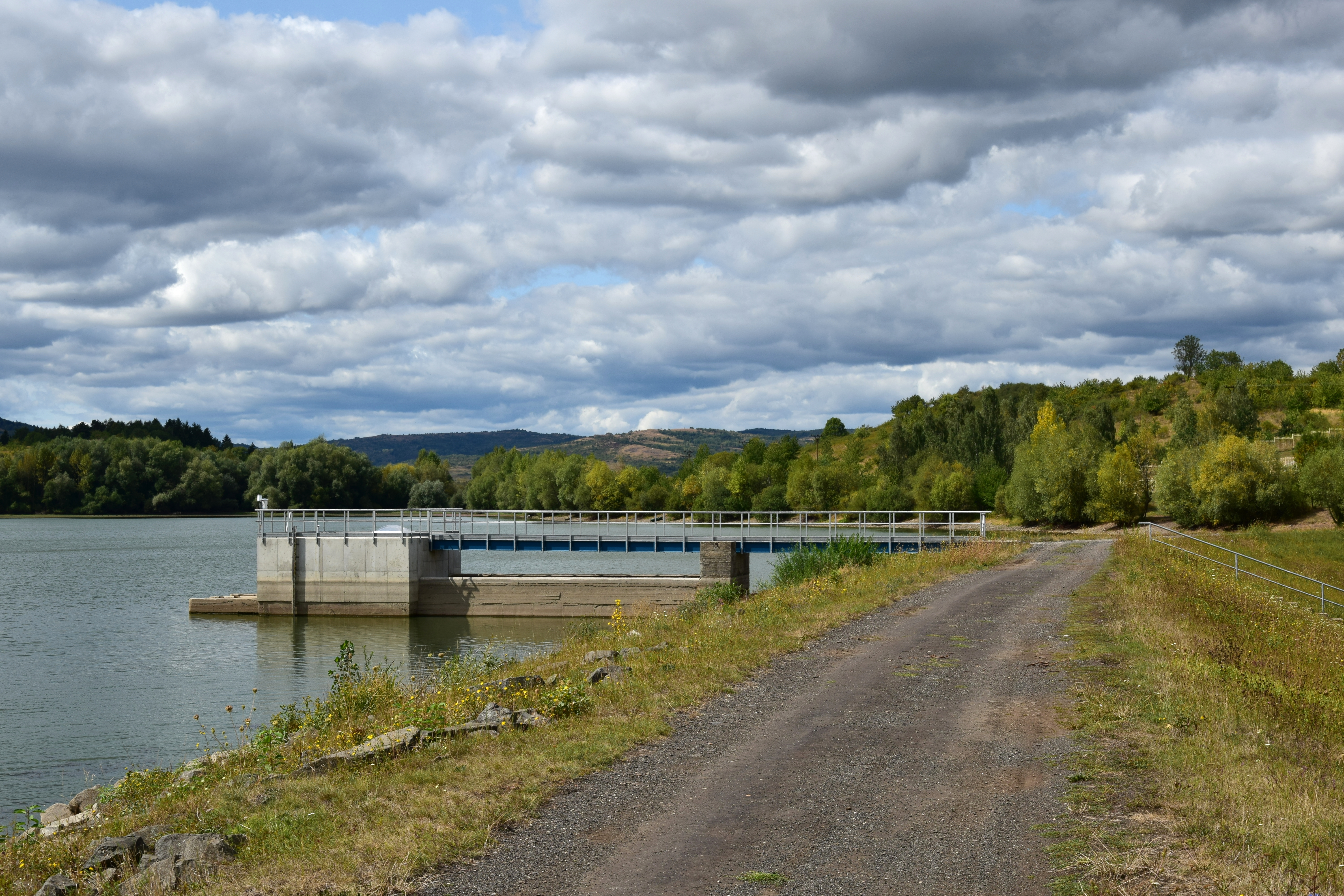 Rybník Sedlec – výpusť